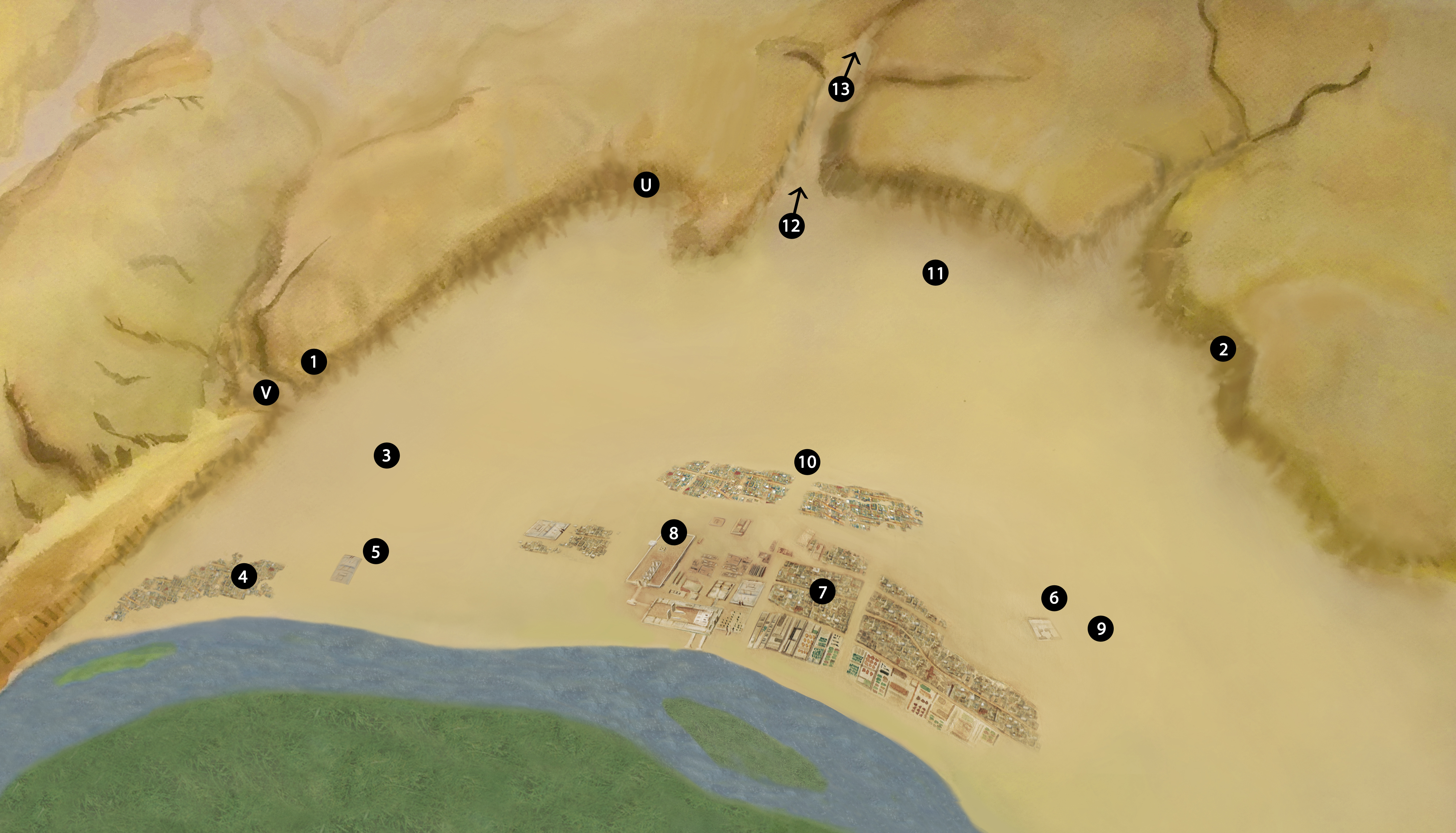 Recreació de la ciutat d'Amarna a vista d'ocell com hauria estat cap al 1340 a.C on podem trobar la vila dels treballadors, Kom el-Nana, la ciutat central, la ciutat principal, el gran temple d'Aton, el barri Nord, el barri Sud i les cartes d'Amarna. La ciutat ha estat recreada a partir del coneixement arqueològic actual (2014). Llegenda: 1. Tombes Nord 2. Tombes Sud 3. Altars 4. Ciutat Nord 5. Palau Nord 6. Maru-Aton 7. Ciutat principal 8. Gran temple d'Aton 9. Kom el-Nana 10. Vila dels treballadors 11. Tombes dels treballadors 12. Vall Reial 13. Tomba d'Akenathon Estela V Estela U Il·lustració feta amb aquarel·la i tractament digital per Joan Lalucat i Adrià Turina, amb l'assessorament de Ramon Serra Massansalvador, historiador, i el seguiment de Luna92 i Dvdgmz. Fonts consultades